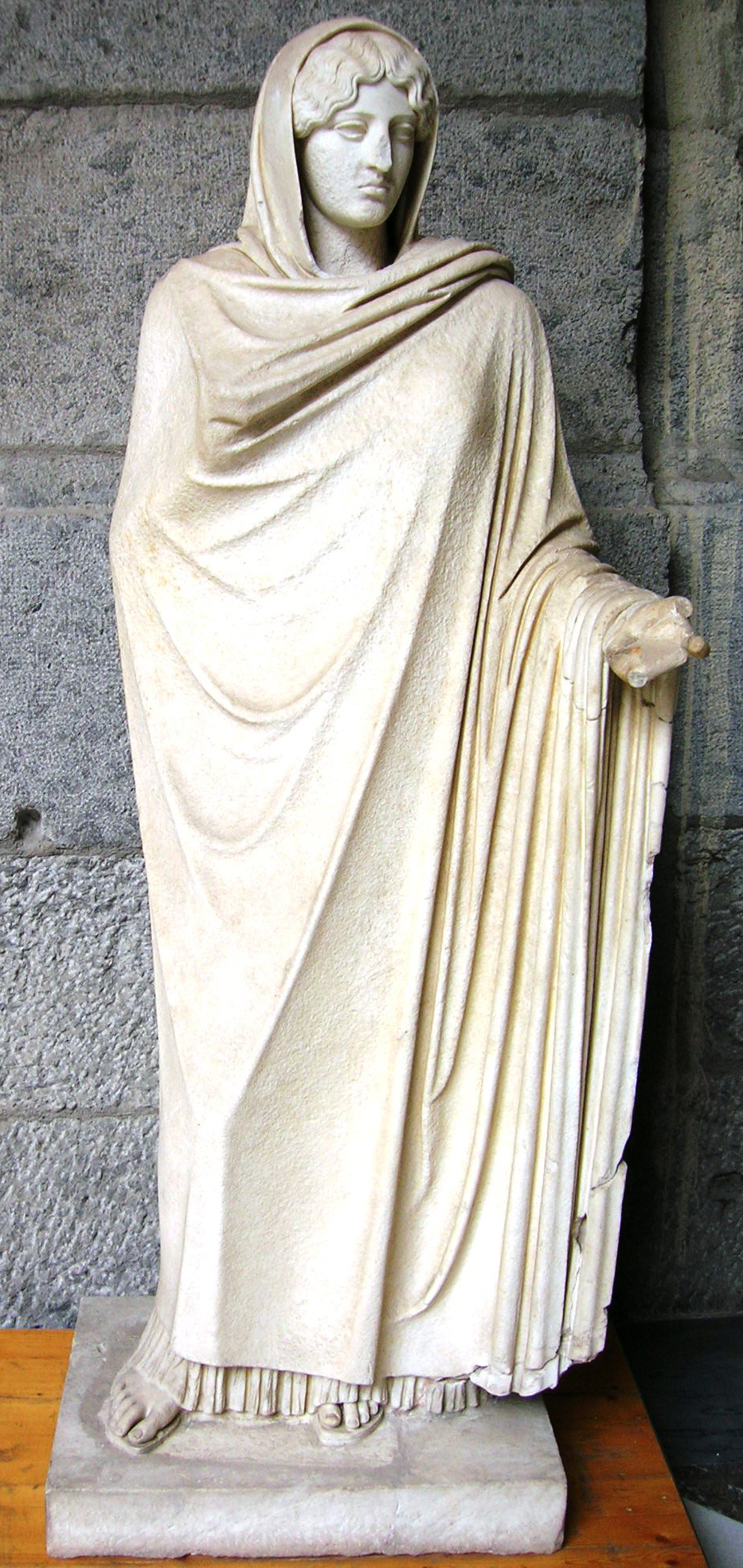 L'Afrodite Sosandra al museo archeologico nazionale a Napoli